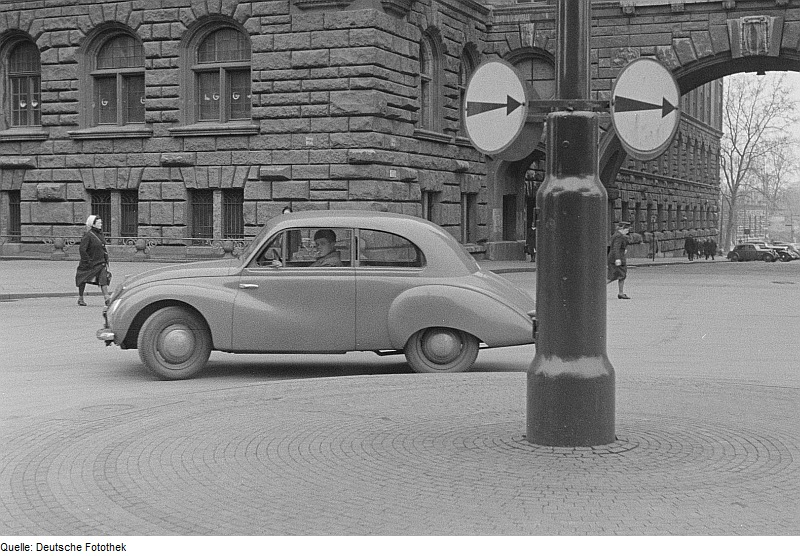 Original image description from the Deutsche Fotothek Kreisverkehr in der Innenstadt